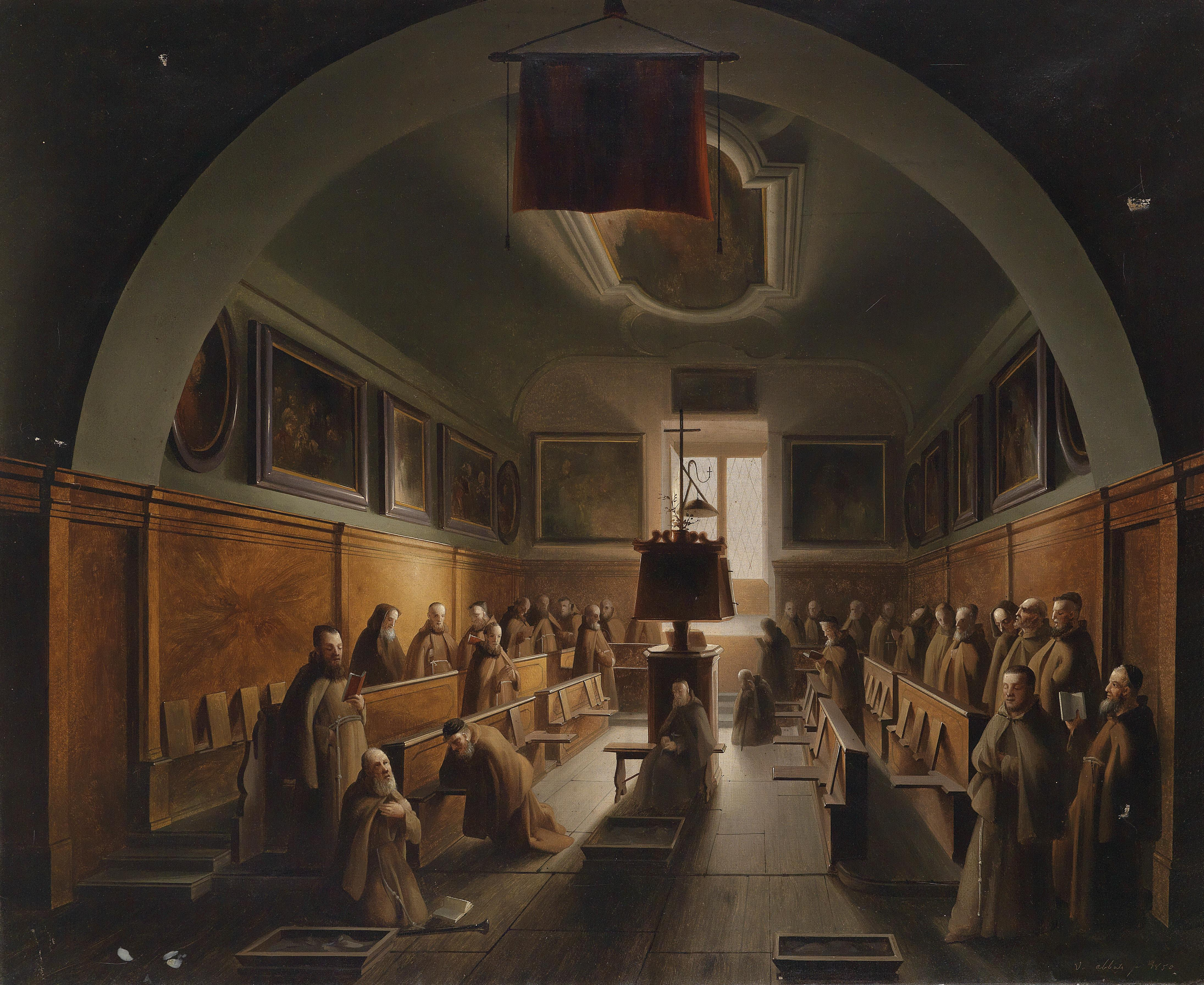 Mönche in der Certosa in Padua